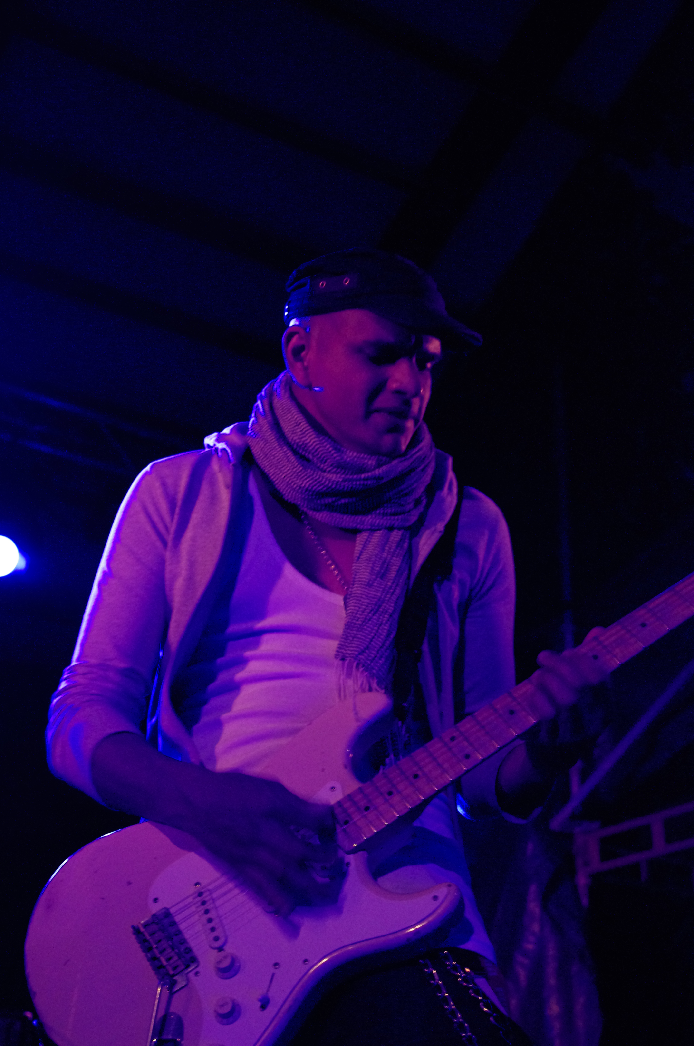 De Lyckliga Kompisarna at Pretzeltown 2011.